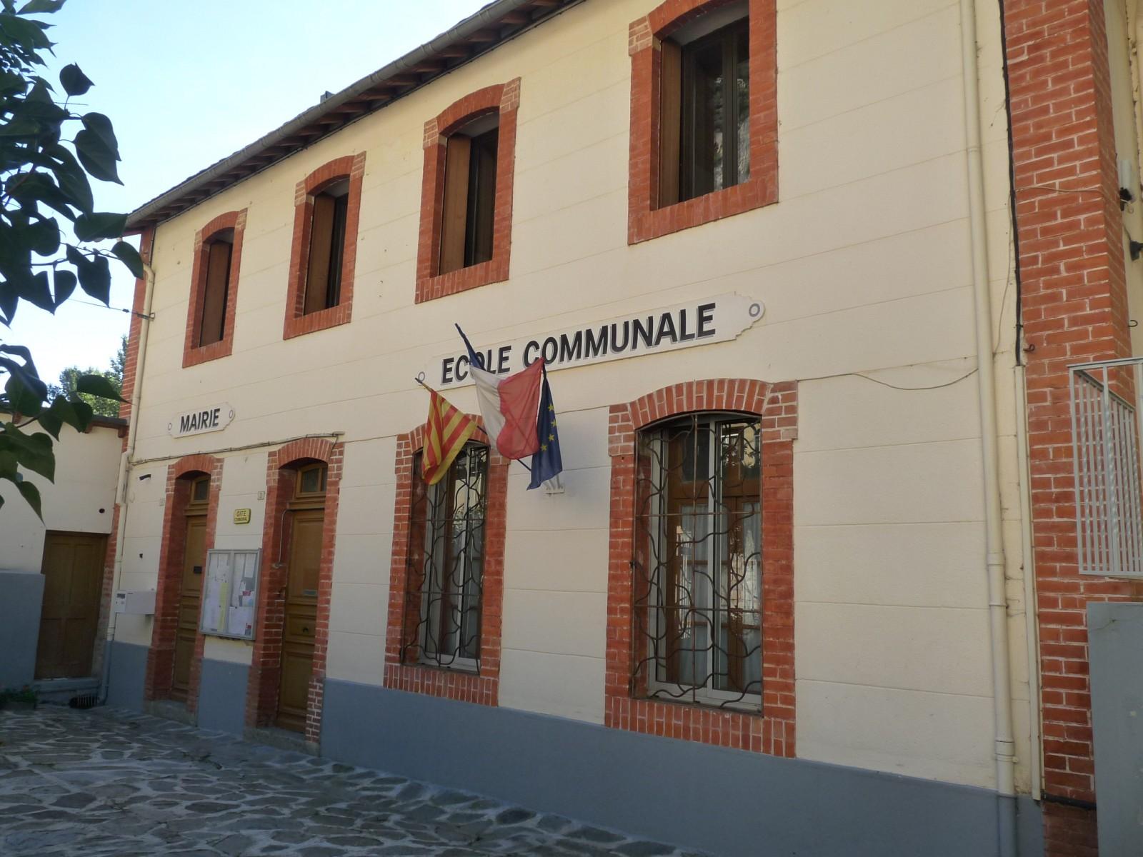 Mairie et école, Thuès-Entre-Valls , Pyrénées-Orientales, France